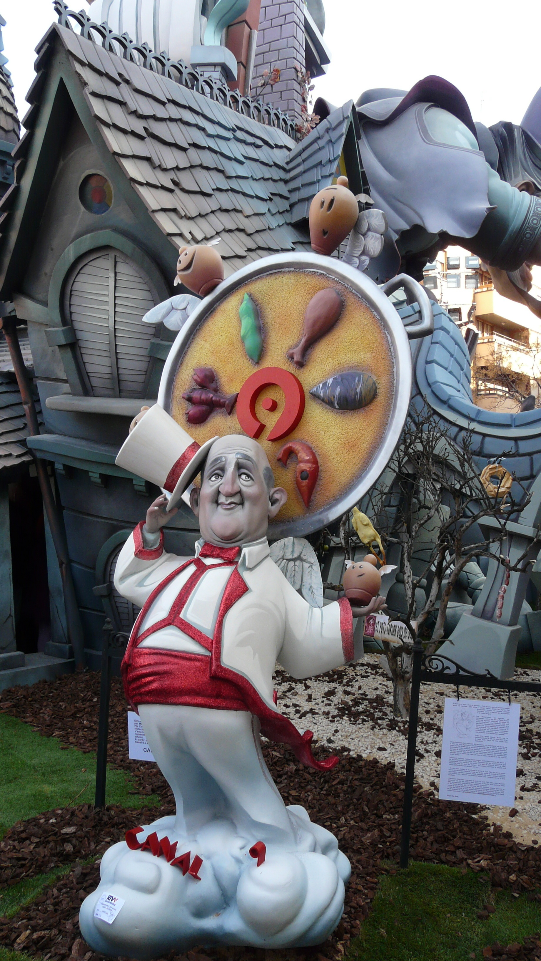 Premiat per Canal 9